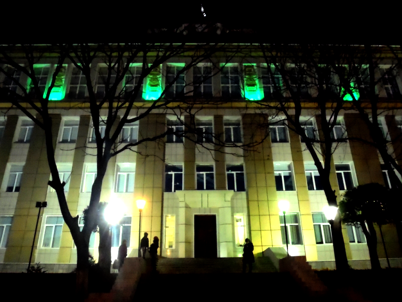 Административный корпус ВГМУ в вечернее время